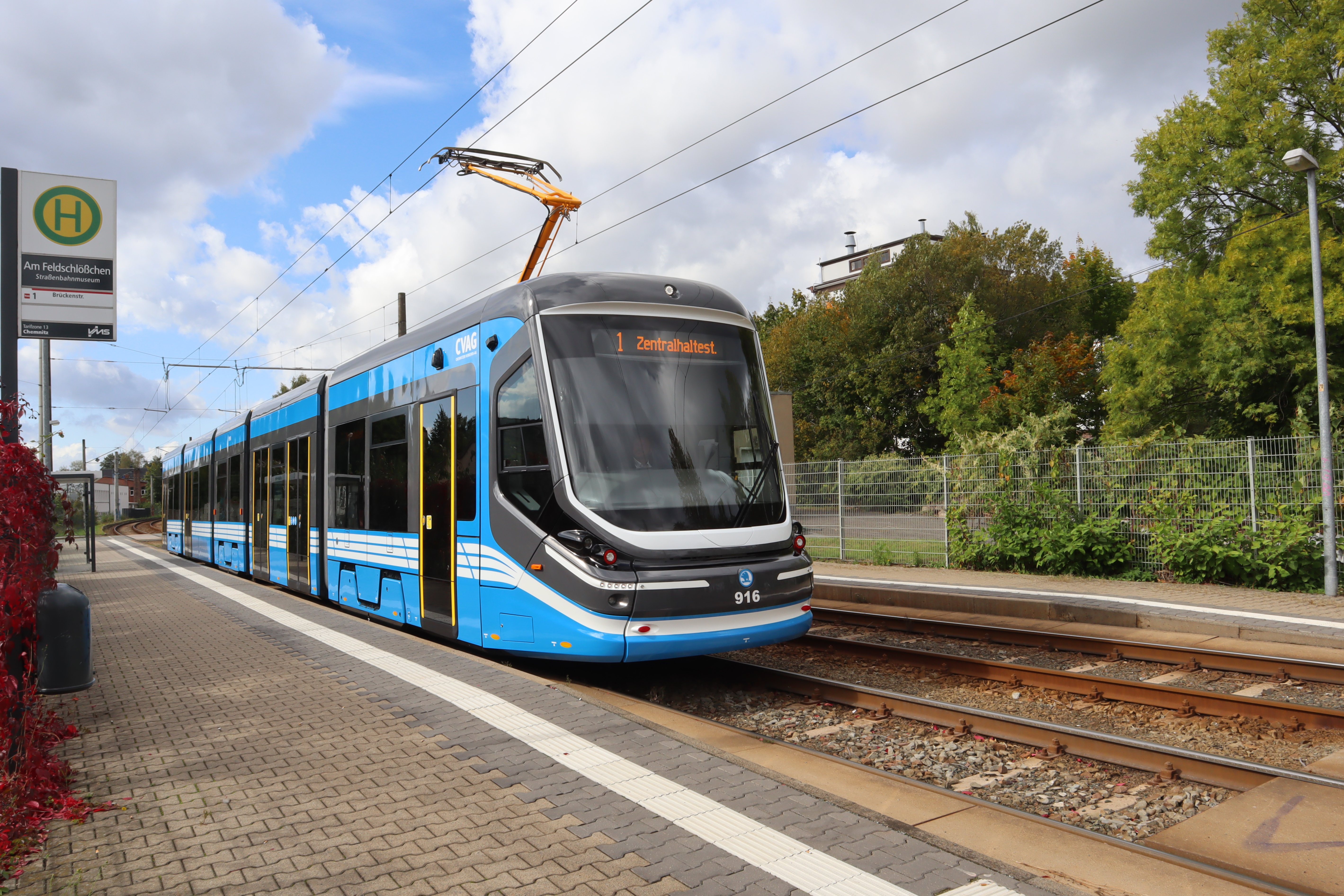 Skoda ForCity Classic (35T) der Chemnitzer Verkehrs-AG an der Haltestelle Am Feldschlösschen (Strassenbahnmuseum)